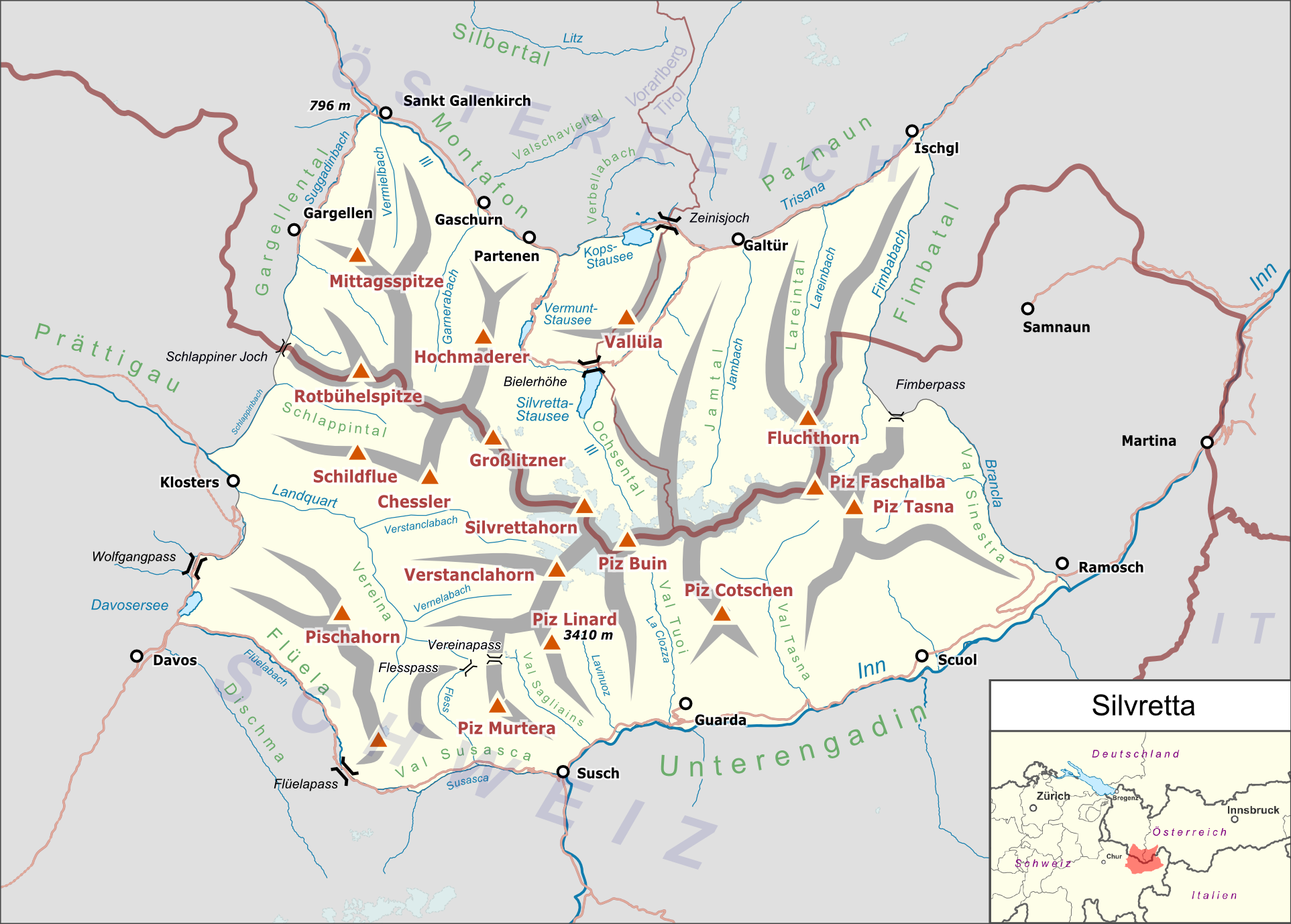 Lagekarte der Silvretta